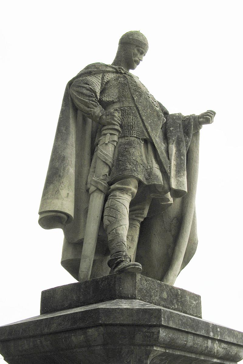 König Konrad Denkmal in Villmar (errichtet 1894)